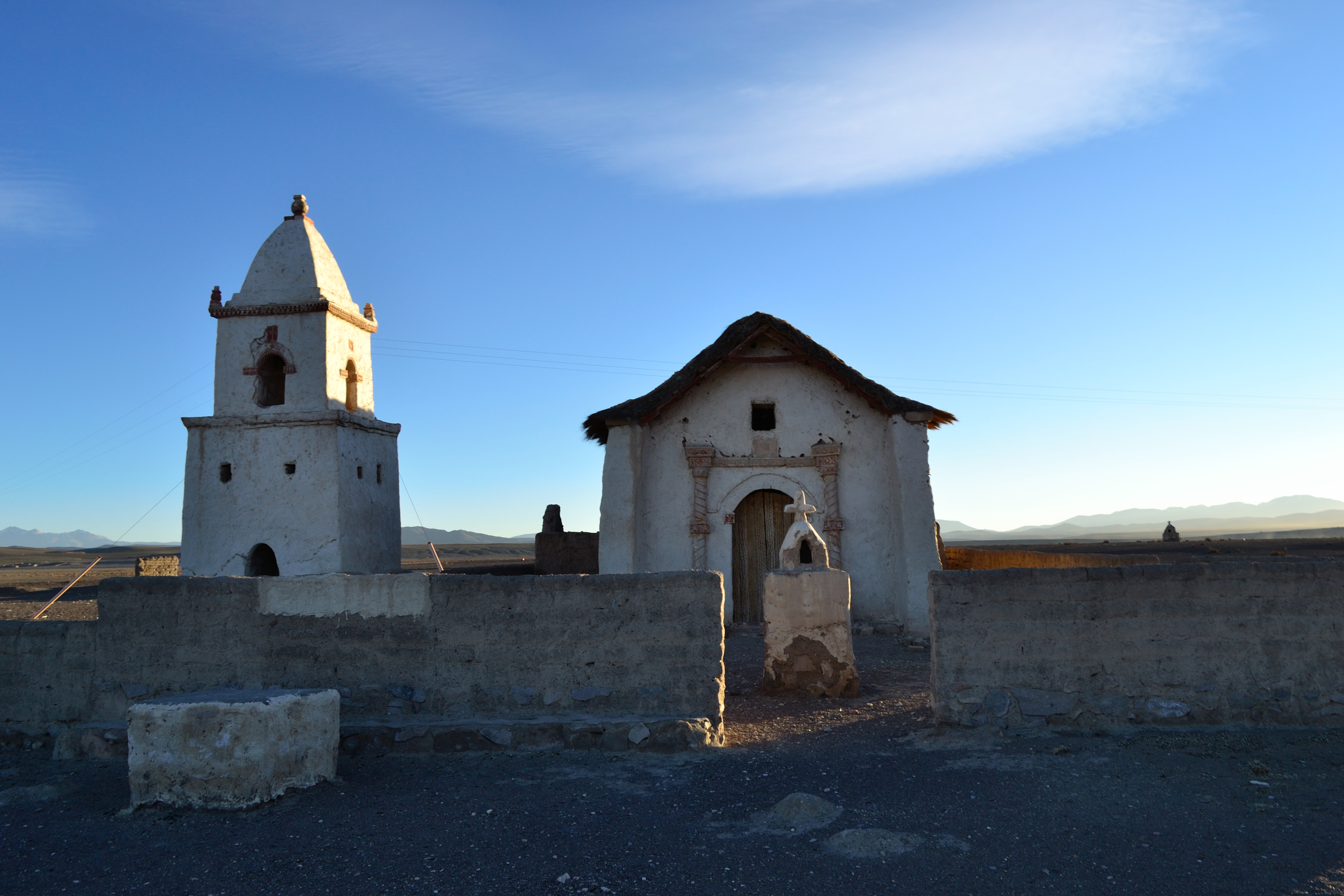 Iglesia de Achauta, al atardecer. This is a photo of a national monument in Chile: 1000